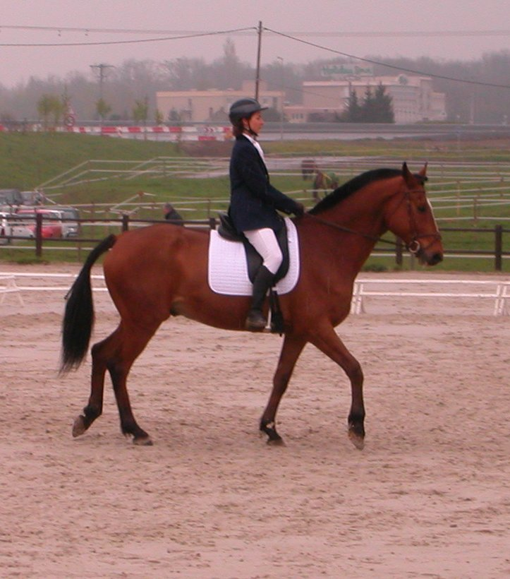 Tällä hevosella on kouluratsastuskilpailuihin sopiva valkoinen satulahuopa.